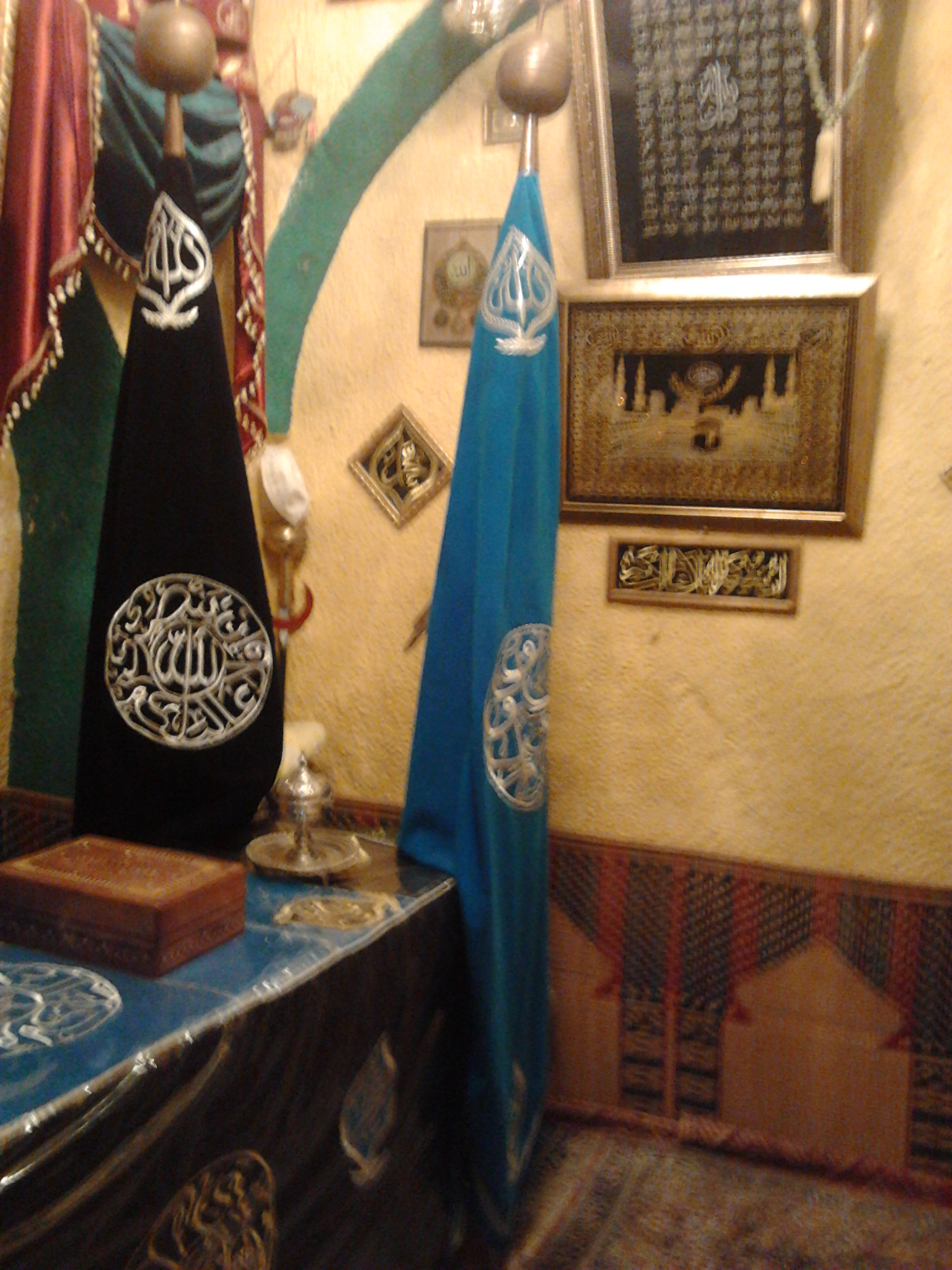 Tombeau de Sidi Ali Lasmar, Bad Jedid, rue du Persan - impasse sidi ali lasmar - Zaouïa Sidi Ali Lasmar